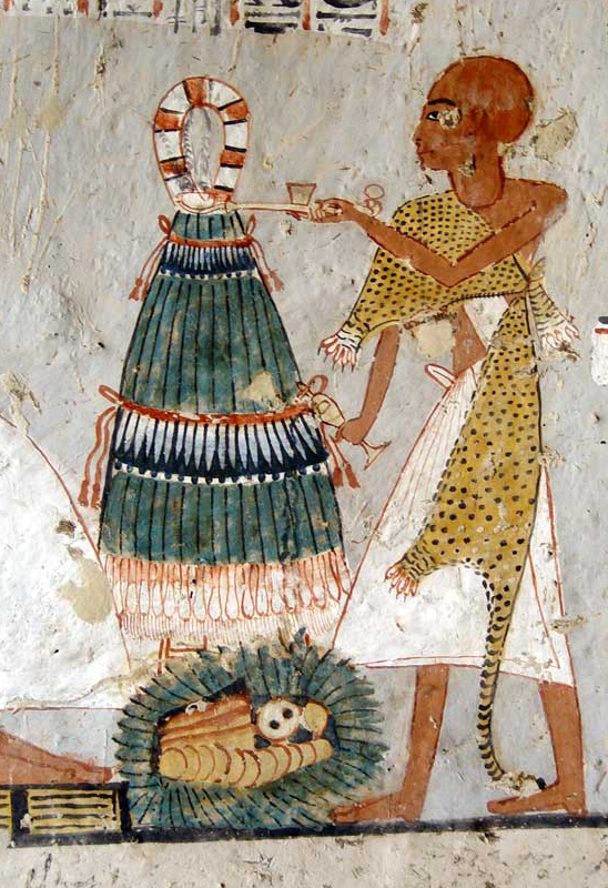 Offrande d'une tresse d'oignons à un défunt par un prêtre lors du mois de Khoiak à Thèbes (époque du Nouvel Empire égyptien)